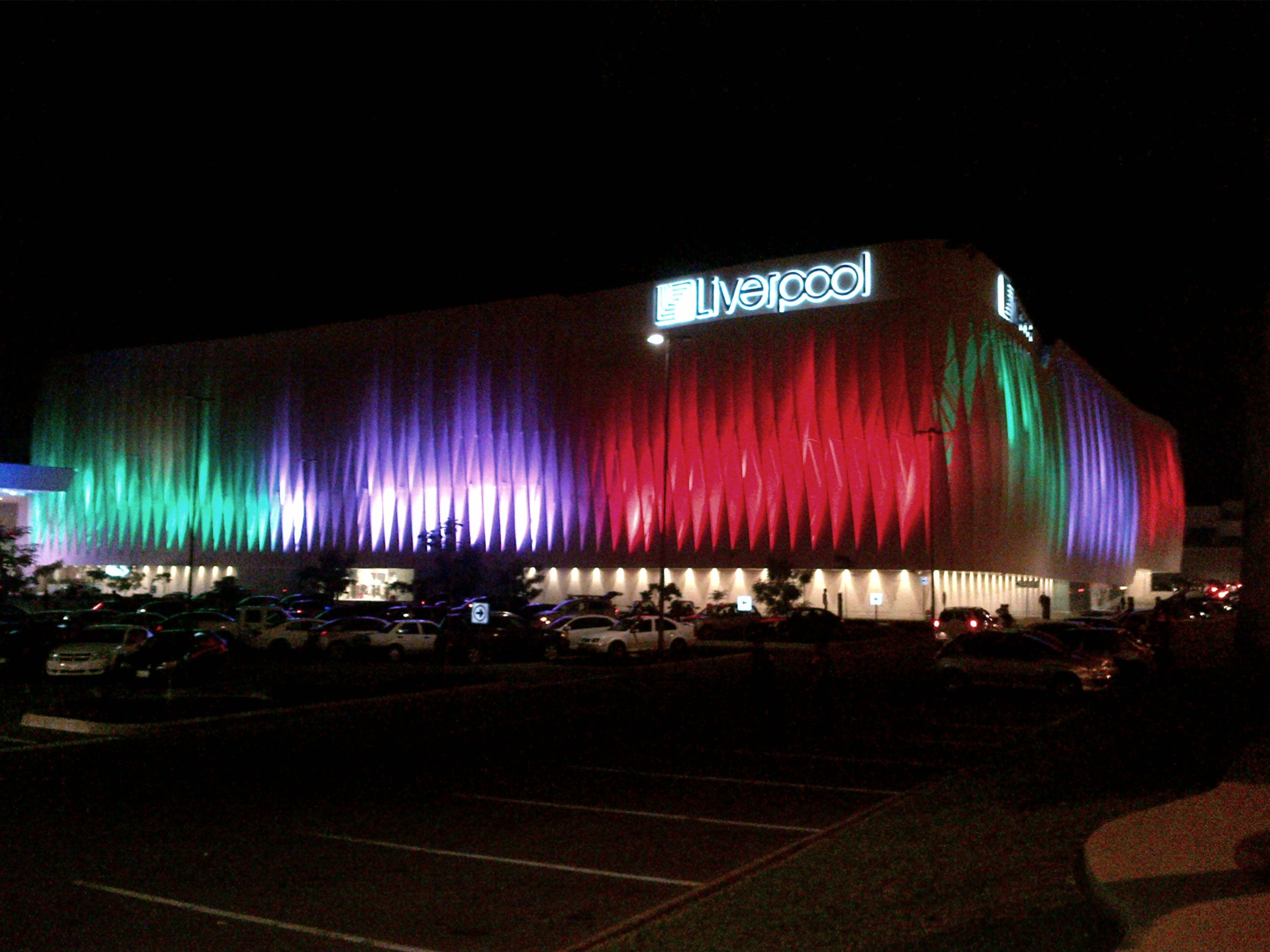 Fachada del almacen Liverpool Villahermosa en Plaza Altabrisa, en la ciudad de Villahermosa, Tabasco, México.